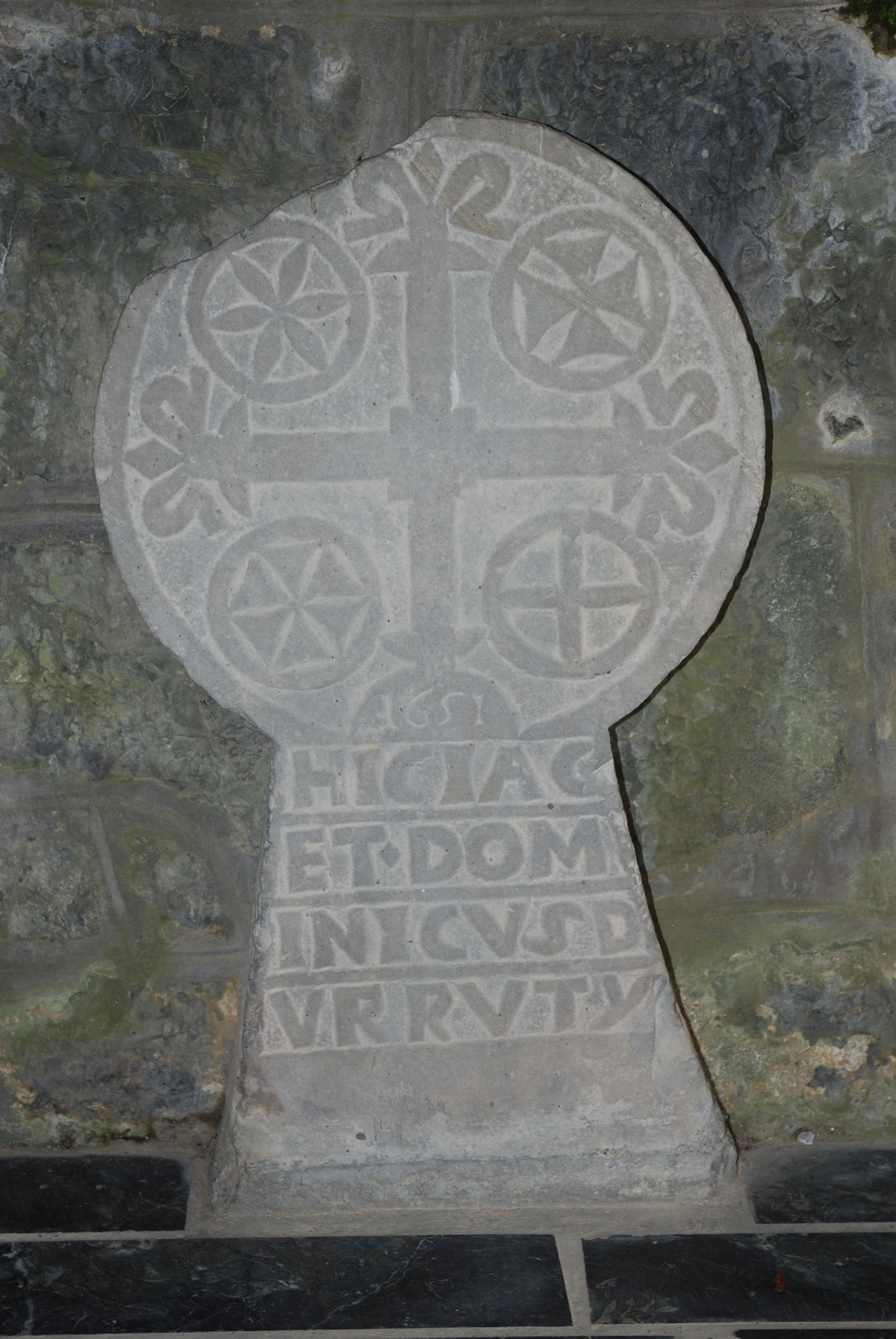 Iholdy, stèle discoïdale